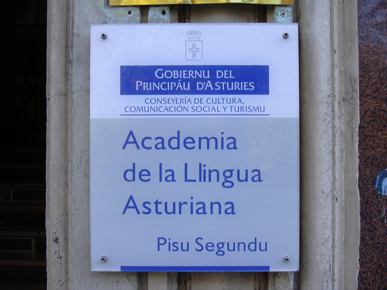 Sede da Academia da Língua Asturiana na cidade espanhola de Oviedo